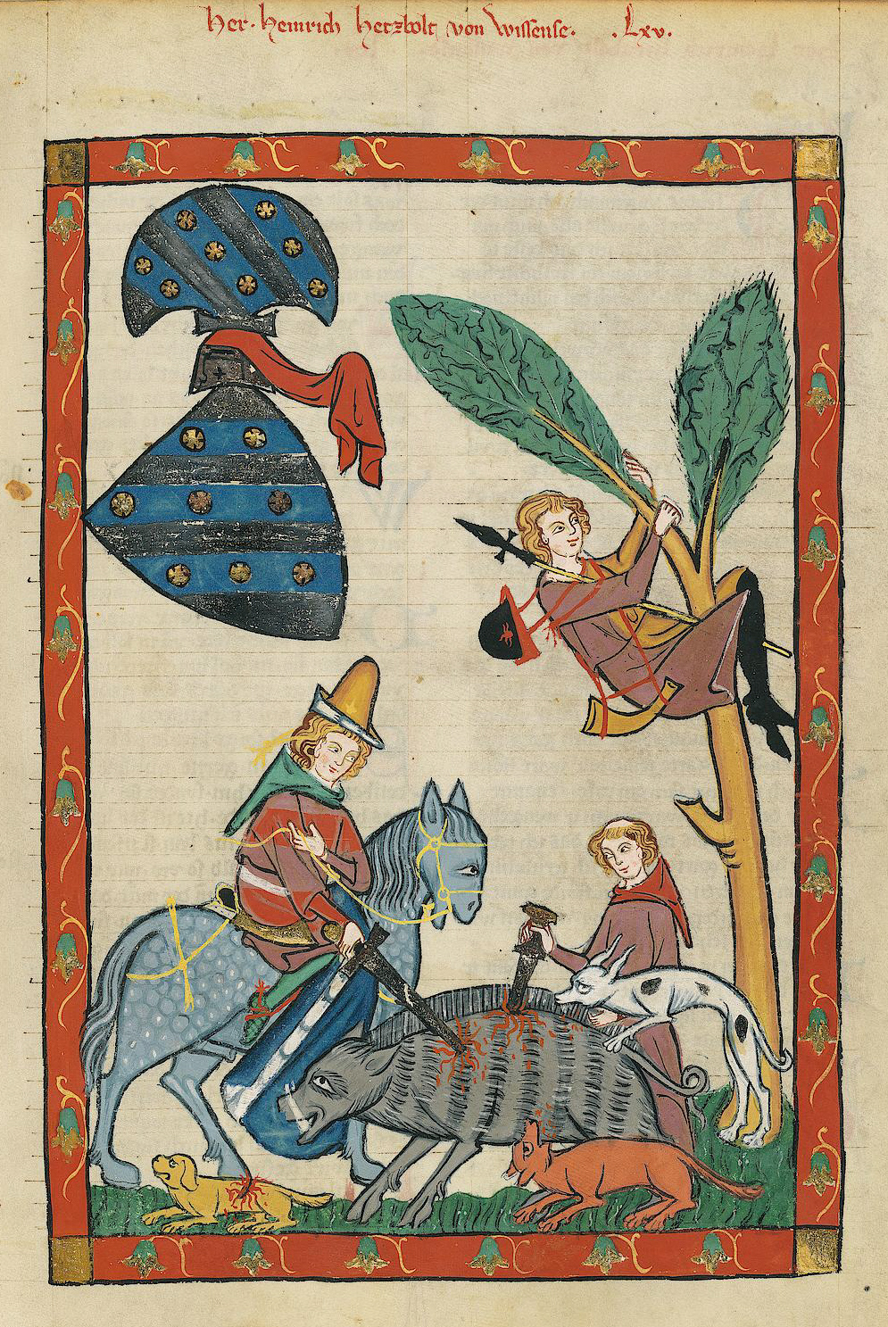 Codex Manesse, UB Heidelberg, Cod. Pal. germ. 848, fol. 228r: Herr Heinrich Hetzbold von Weißensee